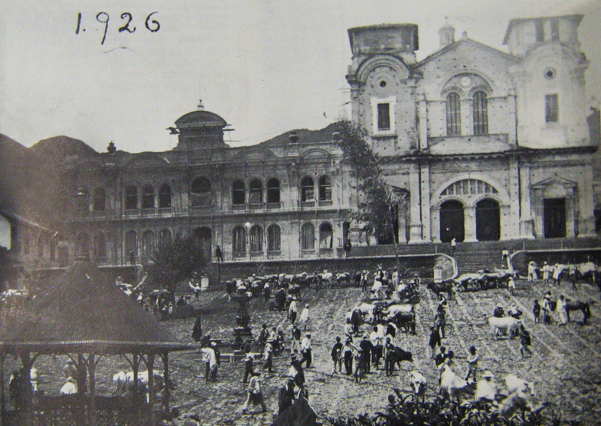 Basílica Menor de Nuestra Señora de la Merced de Yarumal en construcción, 1926, Antioquia, Colombia.